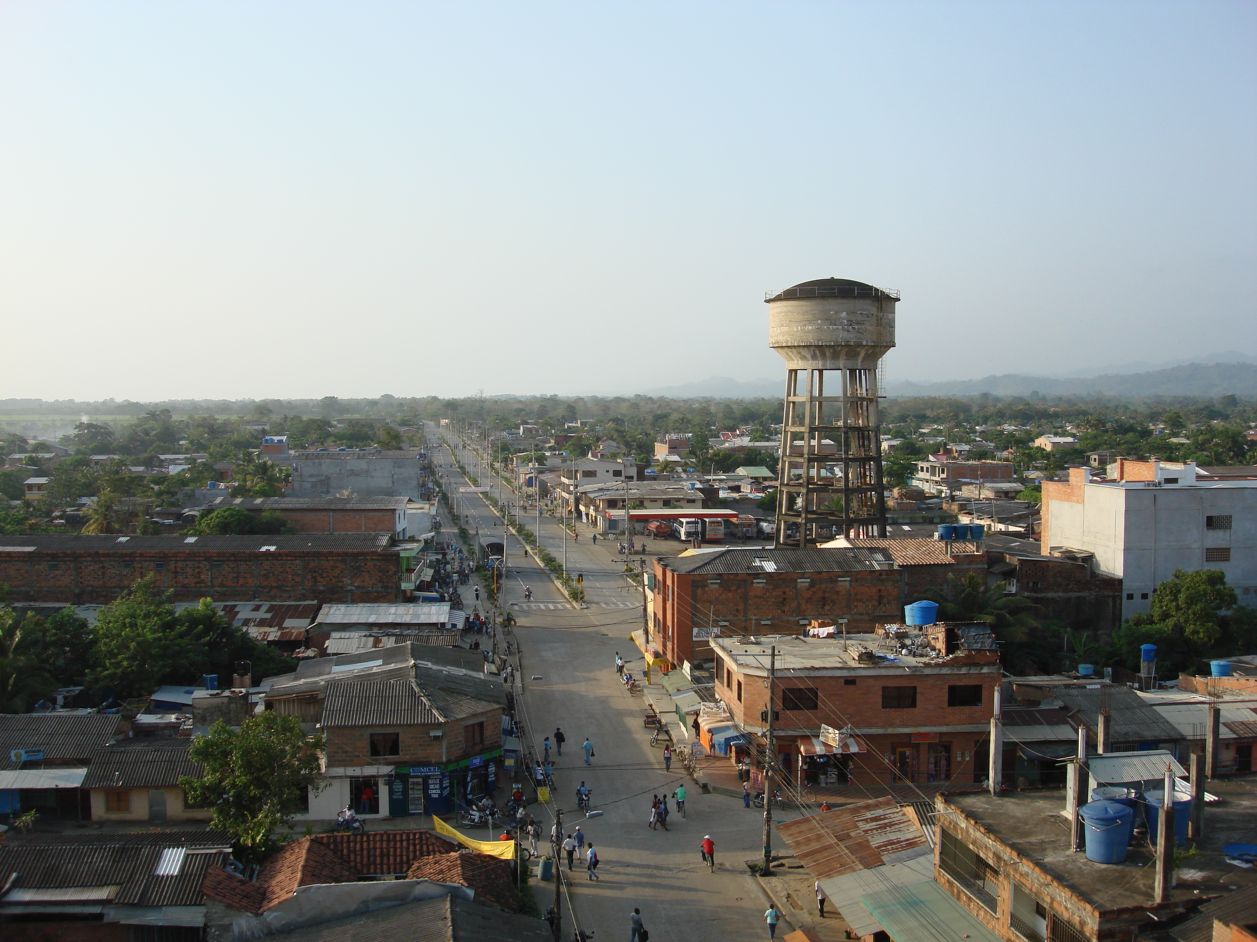 Muncipio de Turbo, parte norte. al fondo la serrania de Abibe